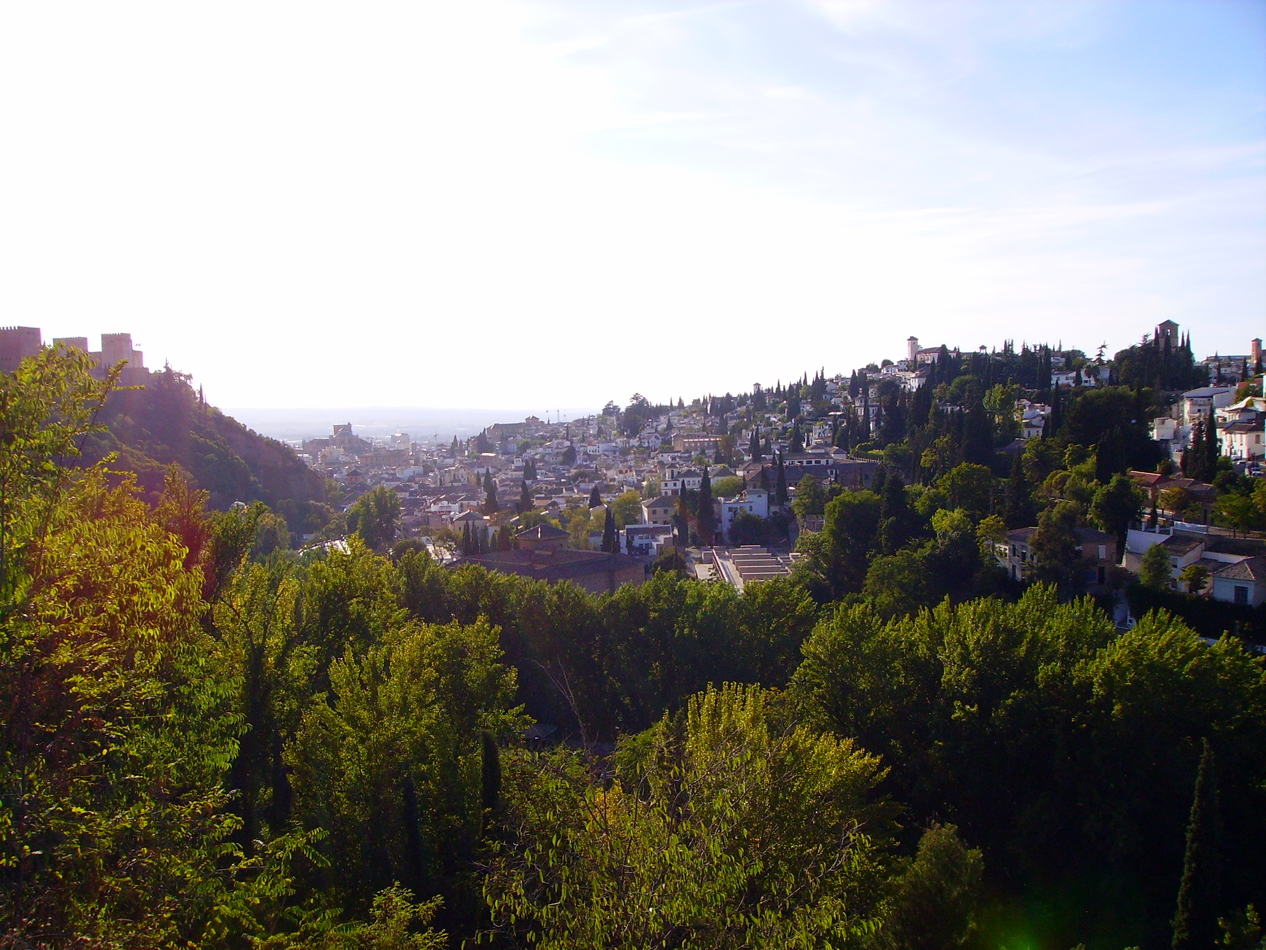 Panorama of Granada from the Alhambra Hill